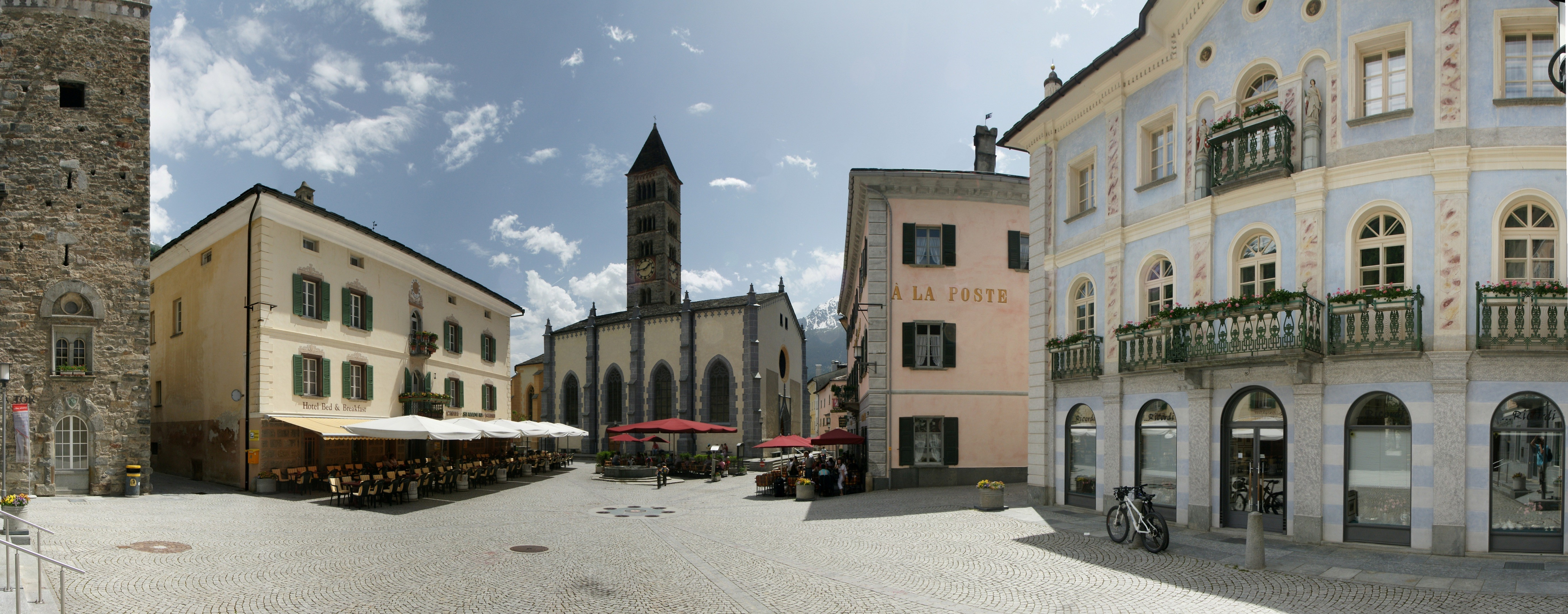 Piazza di Communale. Poschiavo (deutsch/rätoromanisch Puschlav) ist eine politische Gemeinde im südlichen Graubünden (Schweiz). Zusammen mit der Nachbargemeinde Brusio bildet Poschiavo die Talschaft Valposchiavo (deutsch: Puschlav) und den Bezirk Bernina.